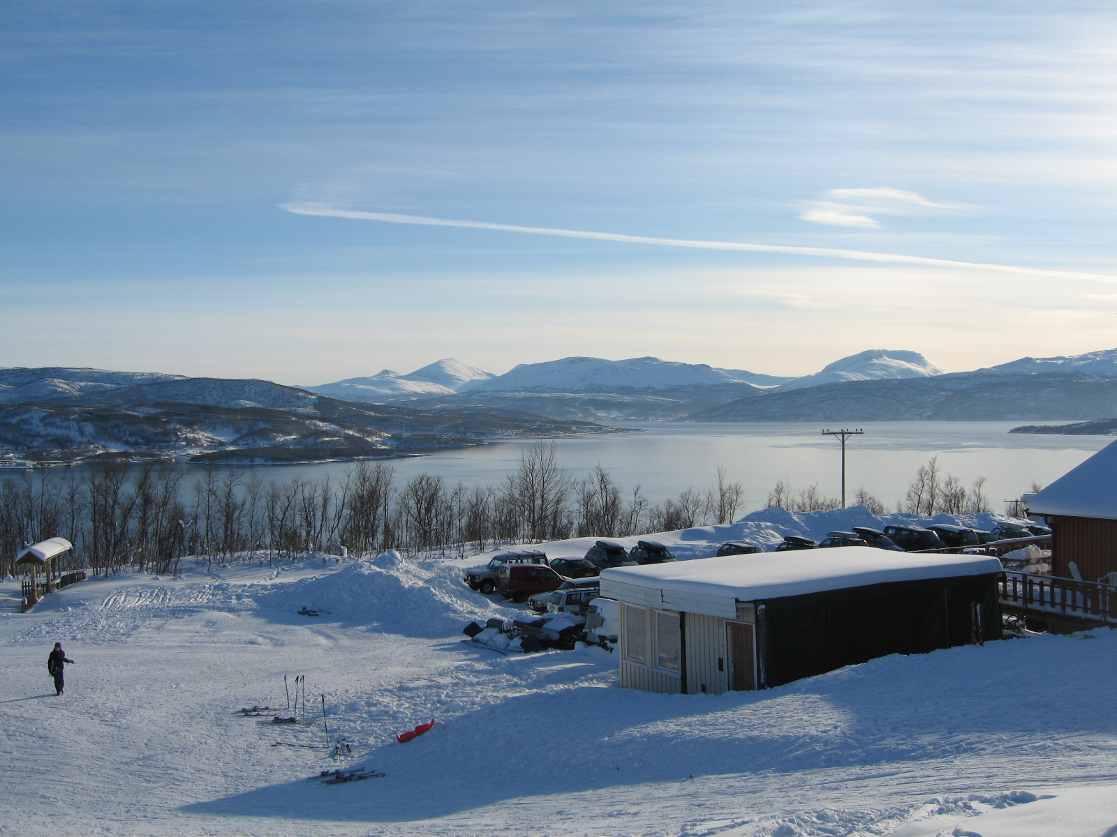 Utsikt over Finnfjorden fra alpinanlegget i Sandviklia